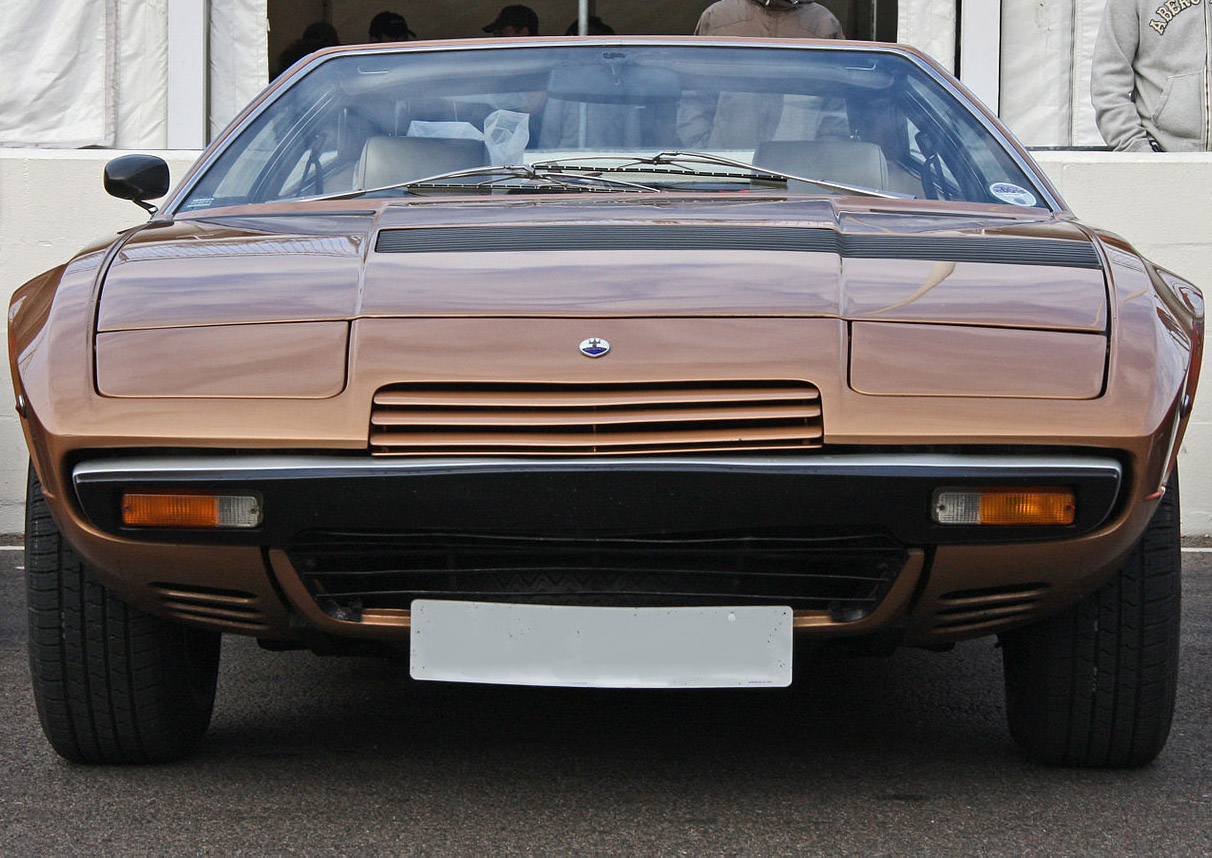 Maserati Khamsin